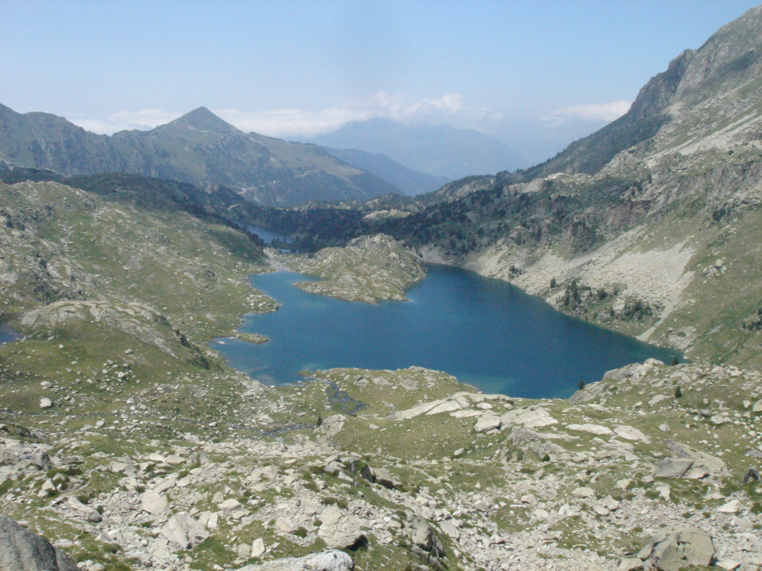 Vista del Lago o Estanh Obago